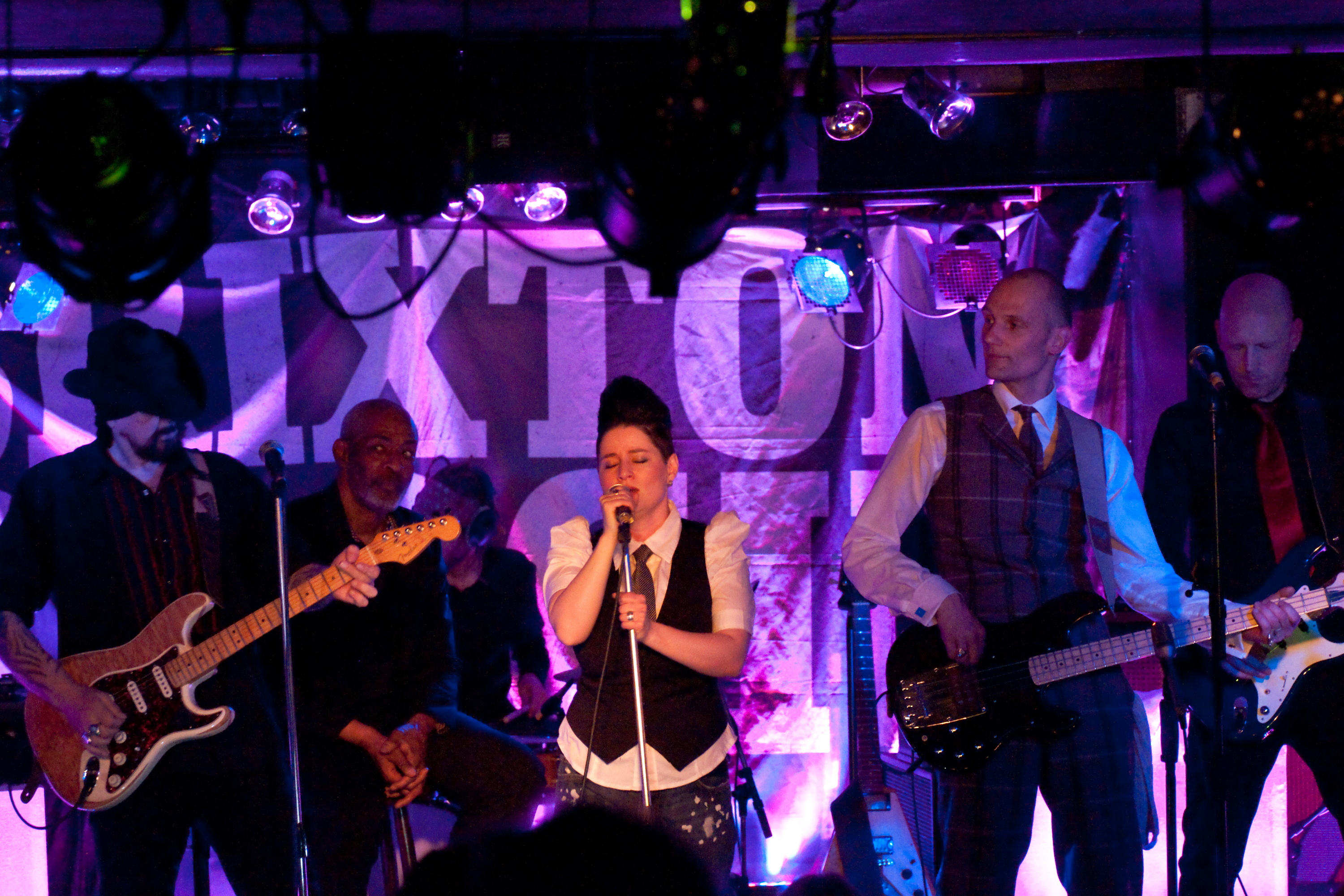 Brixtonboogie (v.li. n.re. Van Wolfen, Wayne Martin, Michi Pahlich, Masha Litterscheid, Krisz Kreuzer und Oliver Schmitt) live im Quasimodo in Berlin am 30.04.2010